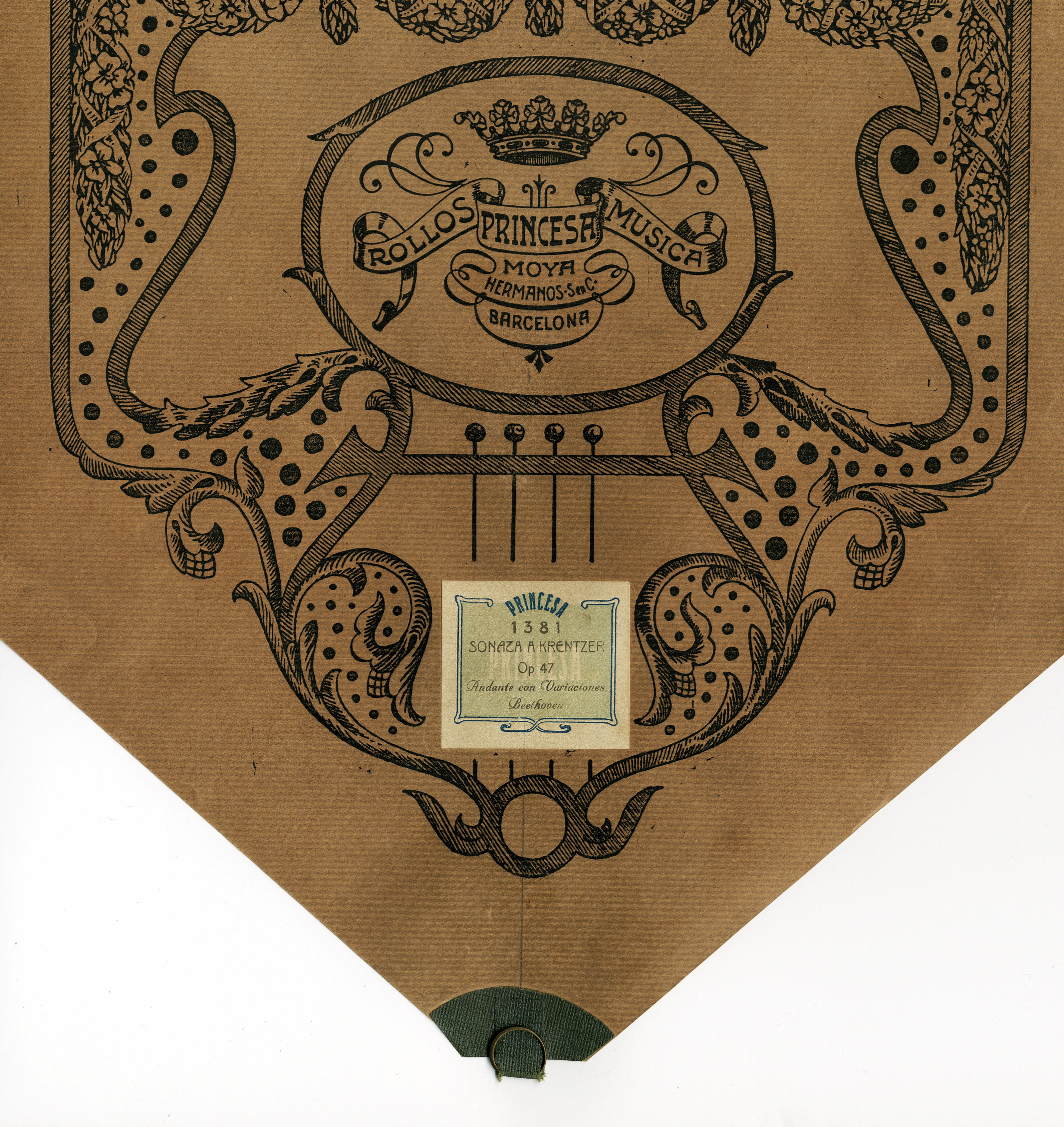 Rollos Princesa, Hermanos Moya, Barcelona